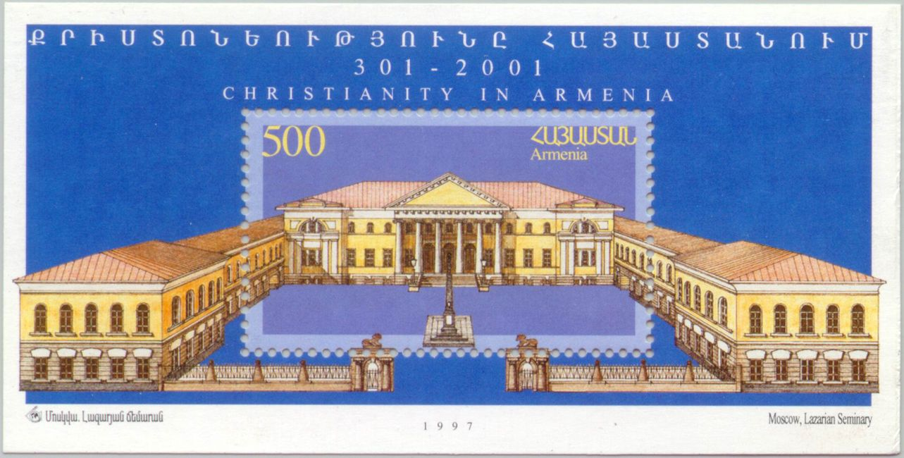 Լազարյան ճեմարան